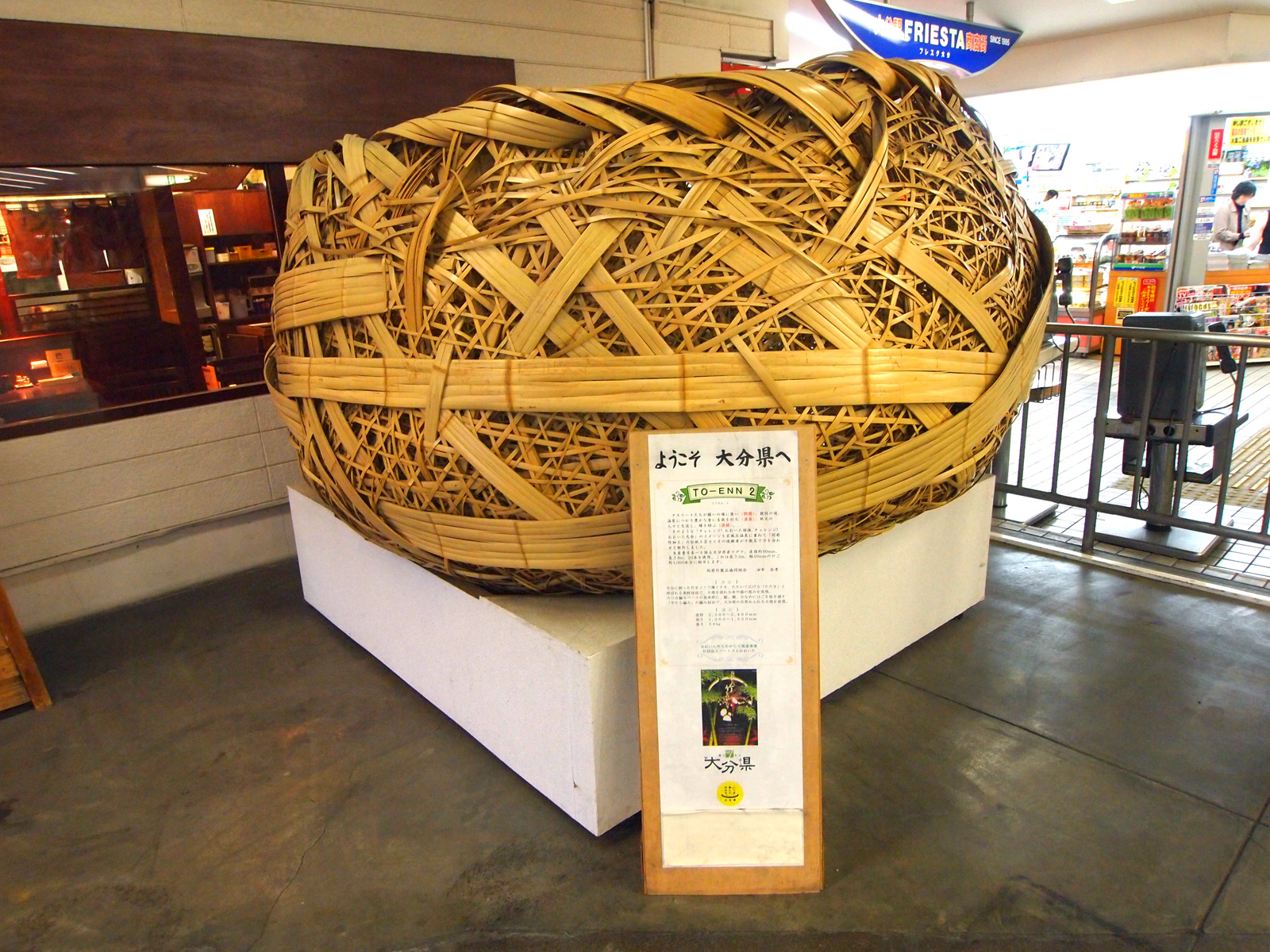 竹細工（大分県大分市大分駅）（大分県大分市）